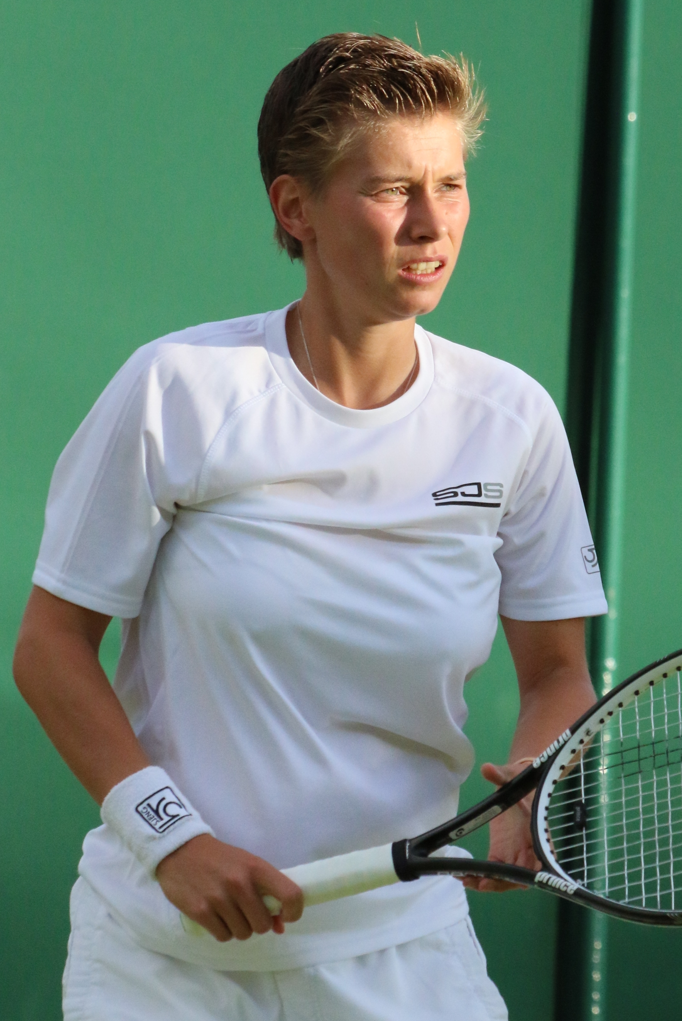 Schuurs WM16 (1)